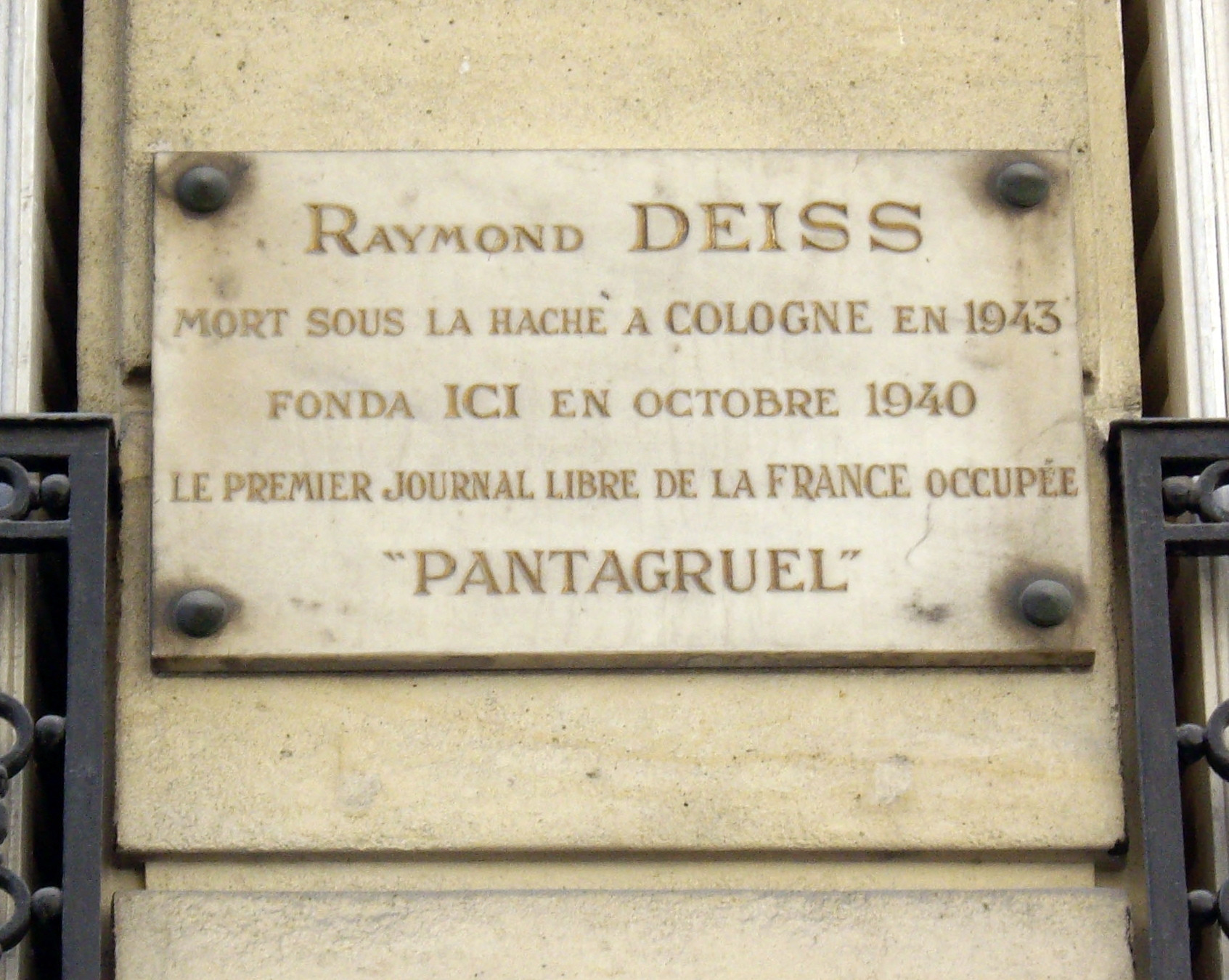 Plaque apposée au n° 5 de la rue Rouget-de-L'Isle, Paris 1er. « Raymond Deiss, mort sous la hache à Cologne en 1943, fonda ici en octobre 1940 le premier journal libre de la France occupée, Pantagruel. »